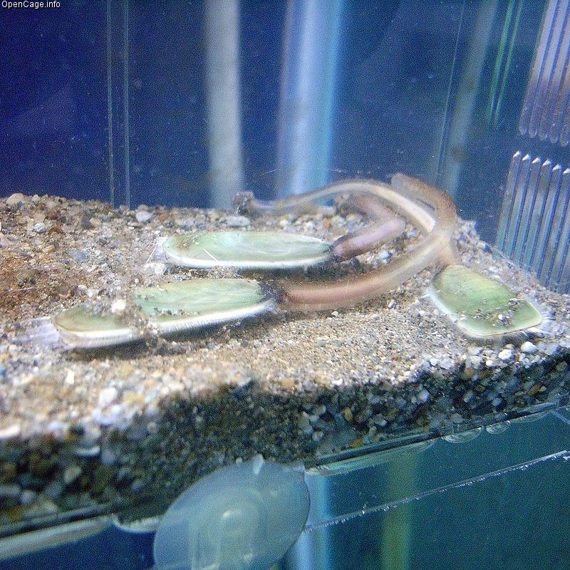 ミドリシャミセンガイ（英名：inarticulate brachiopod 学名：Lingula anatina）